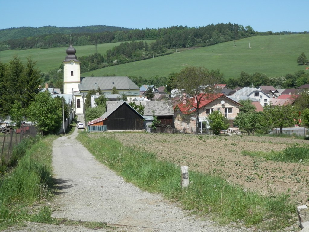 Obec Šarišské Dravce, okres Sabinov. Cesta od cintorína